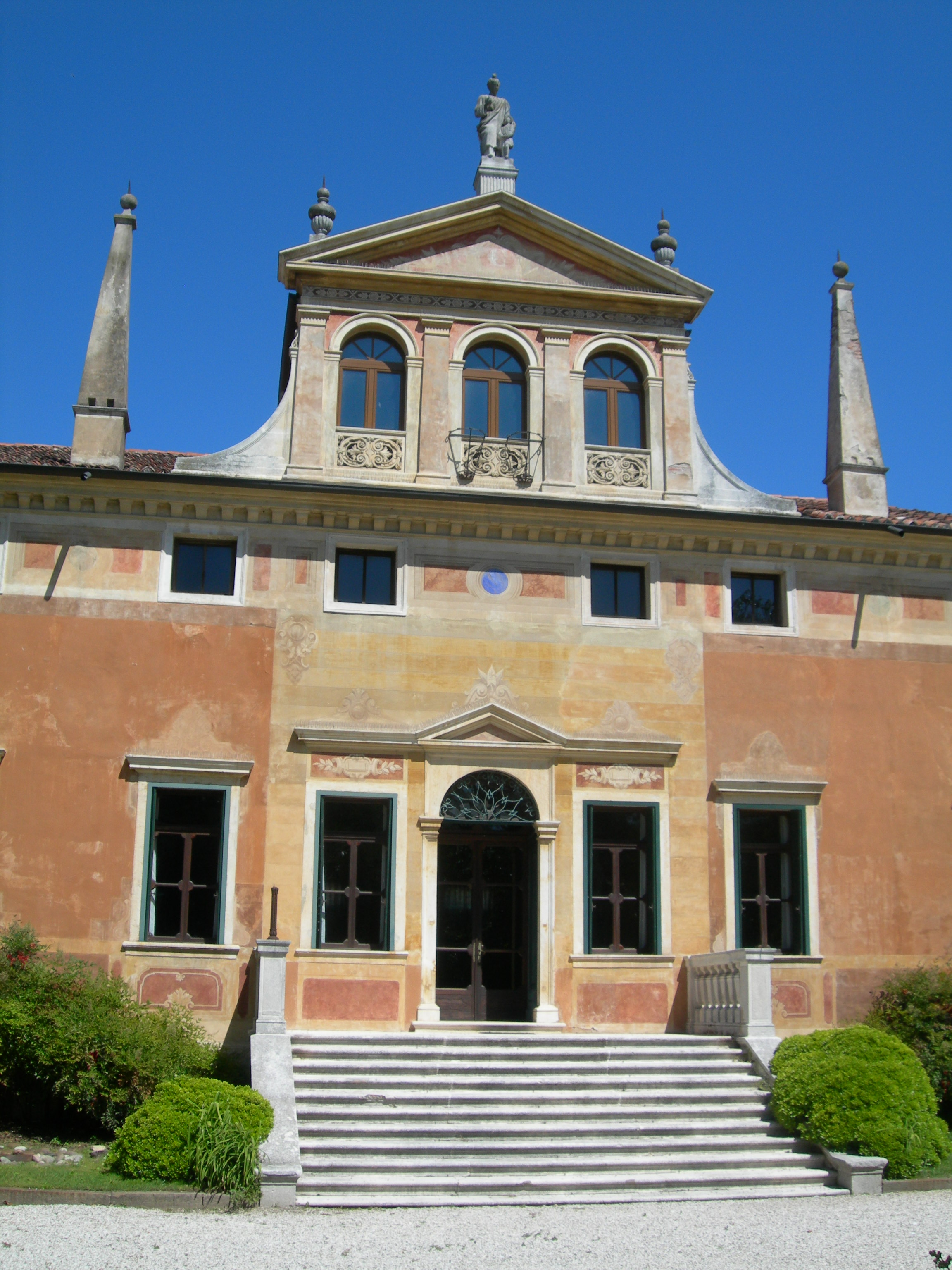 Villa Manin Cantarella (Noventa Vicentina, Provincia di Vicenza)